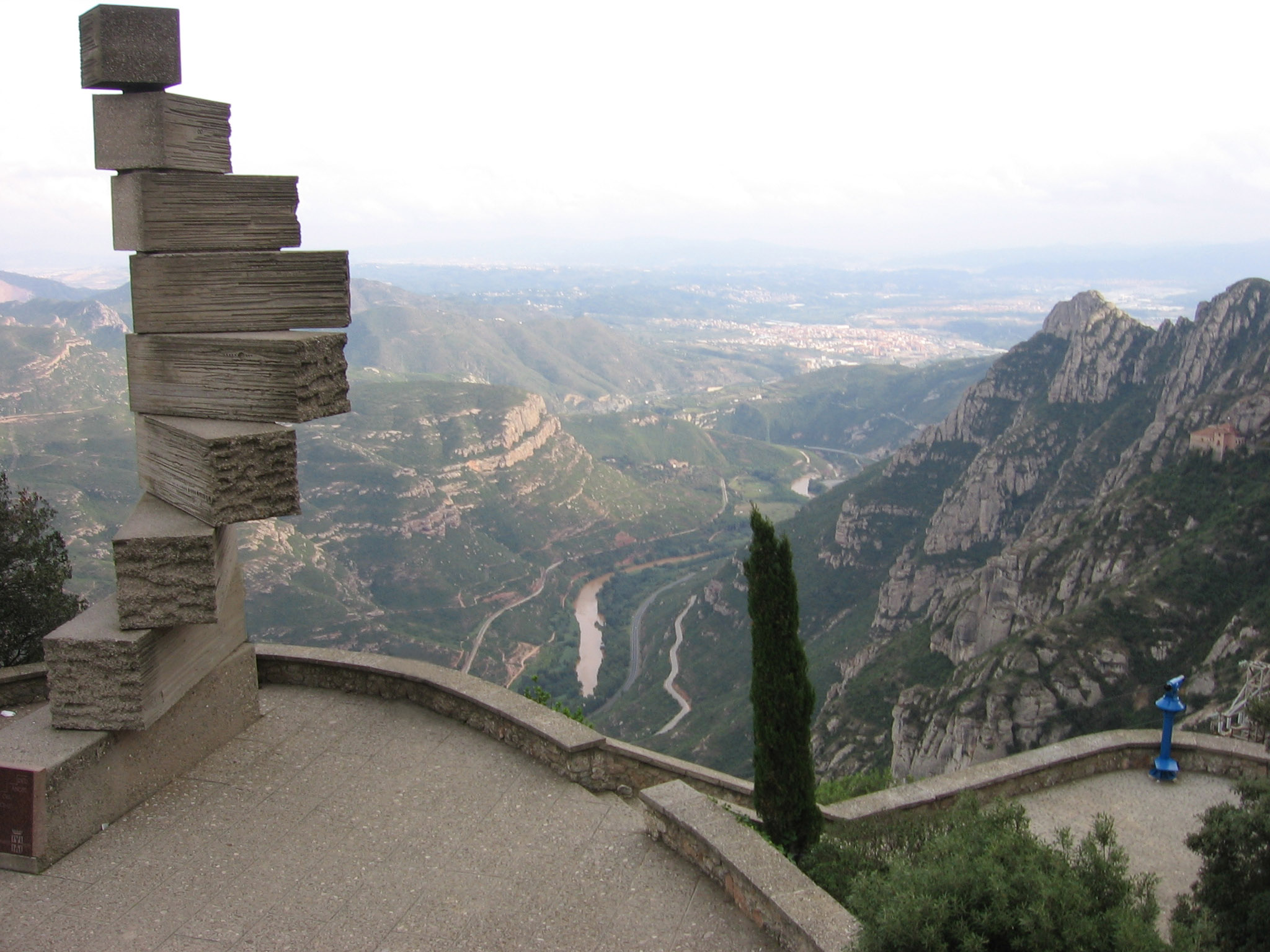 Monumento a Ramon Llull, de Josep Mª Subirachs, Montserrat (Barcelona)